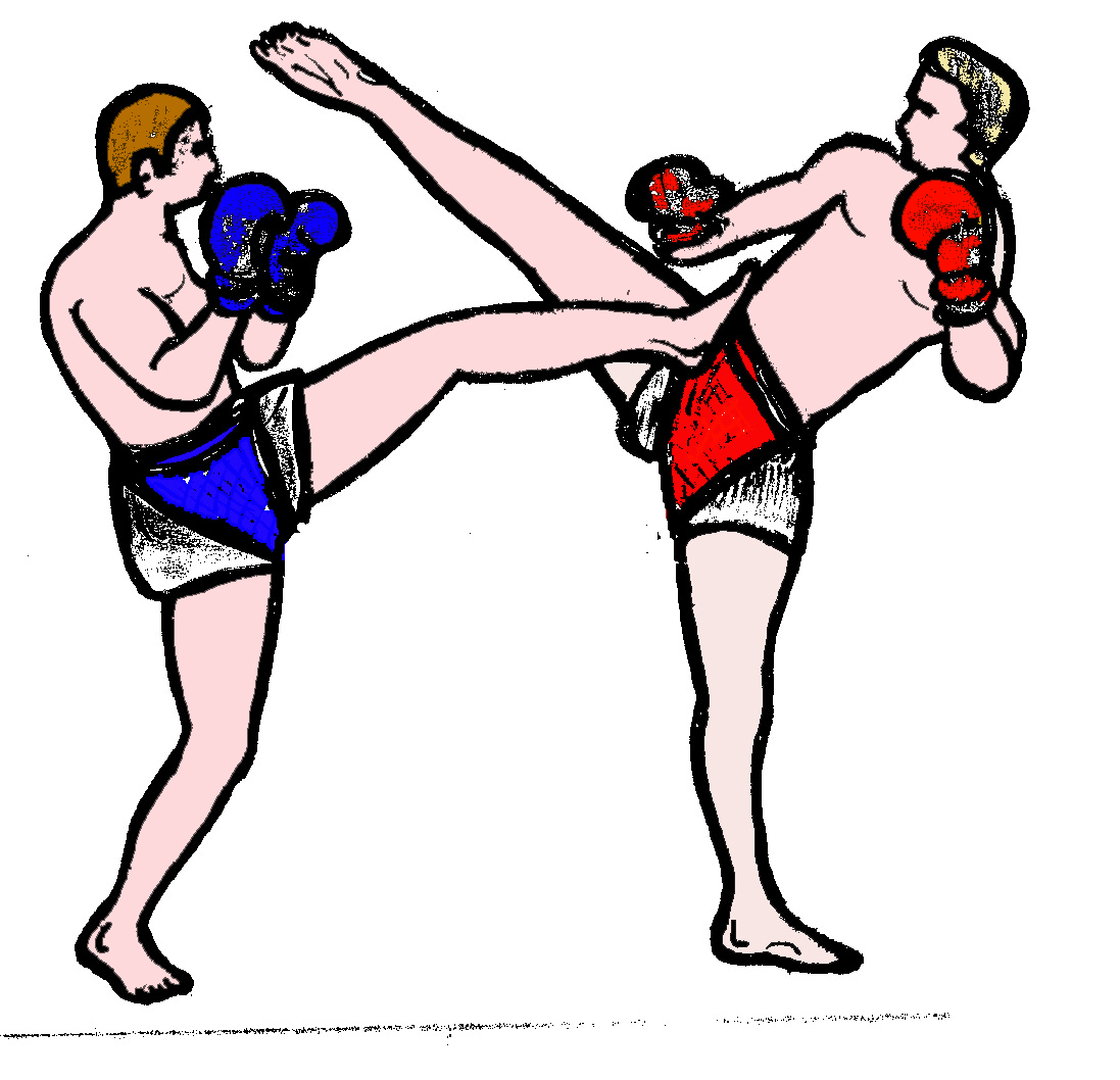 boxe_birmane4.jpg